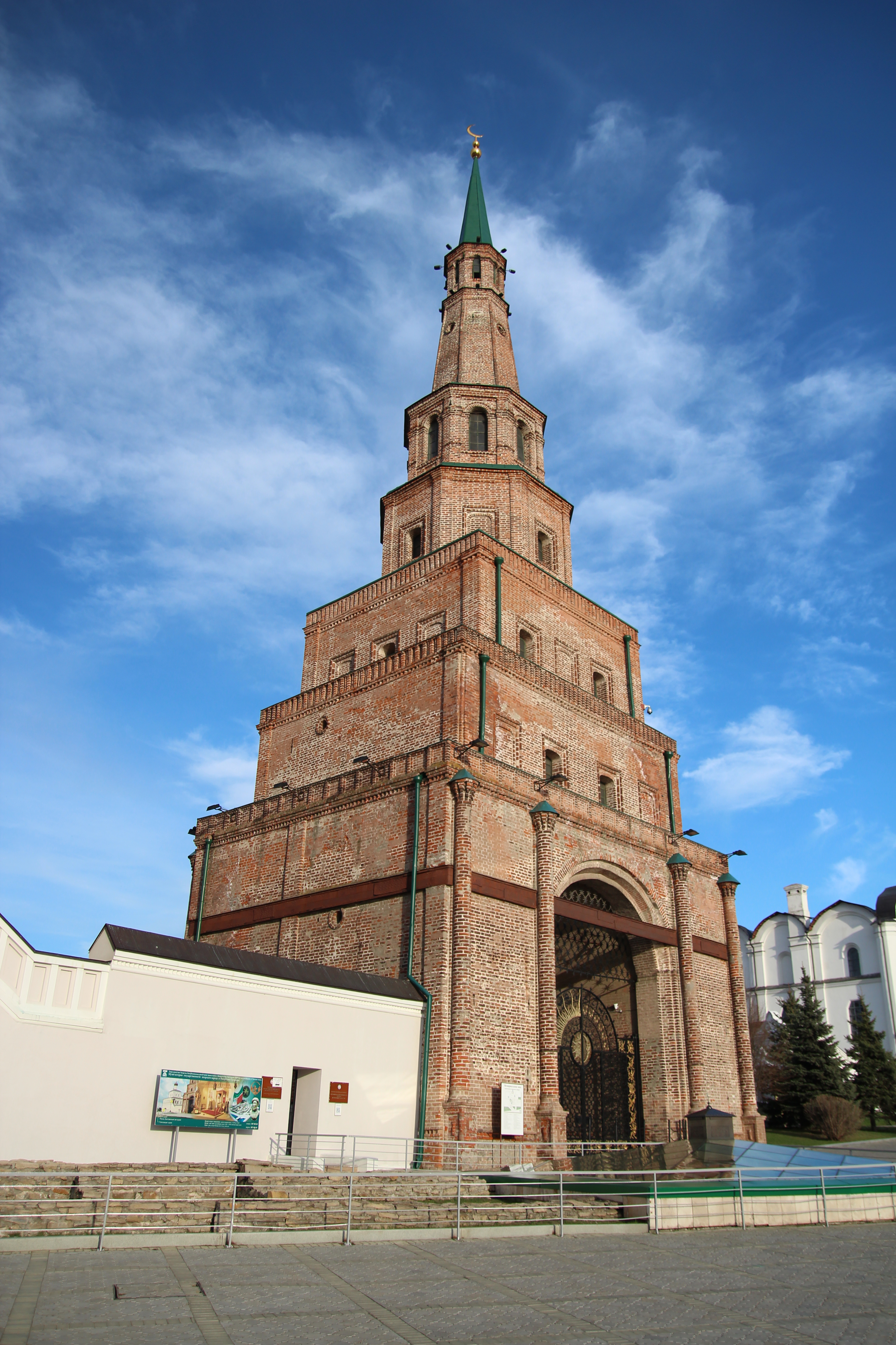 Башня Сююмбике: Кремль, Казань, Татарстан